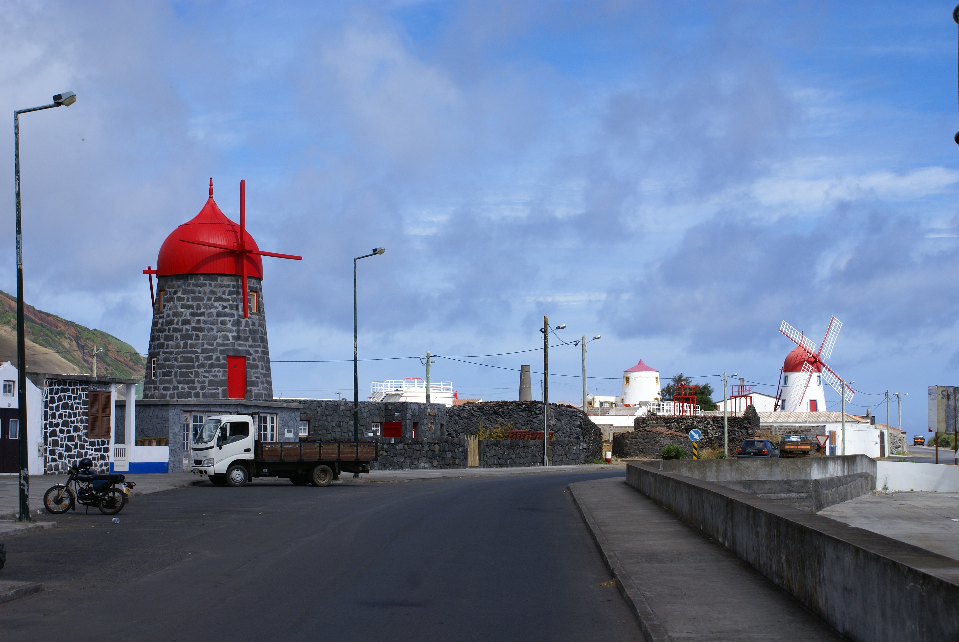 Típicos moinhos de vento da ilha Graciosa, Açores, Portugal